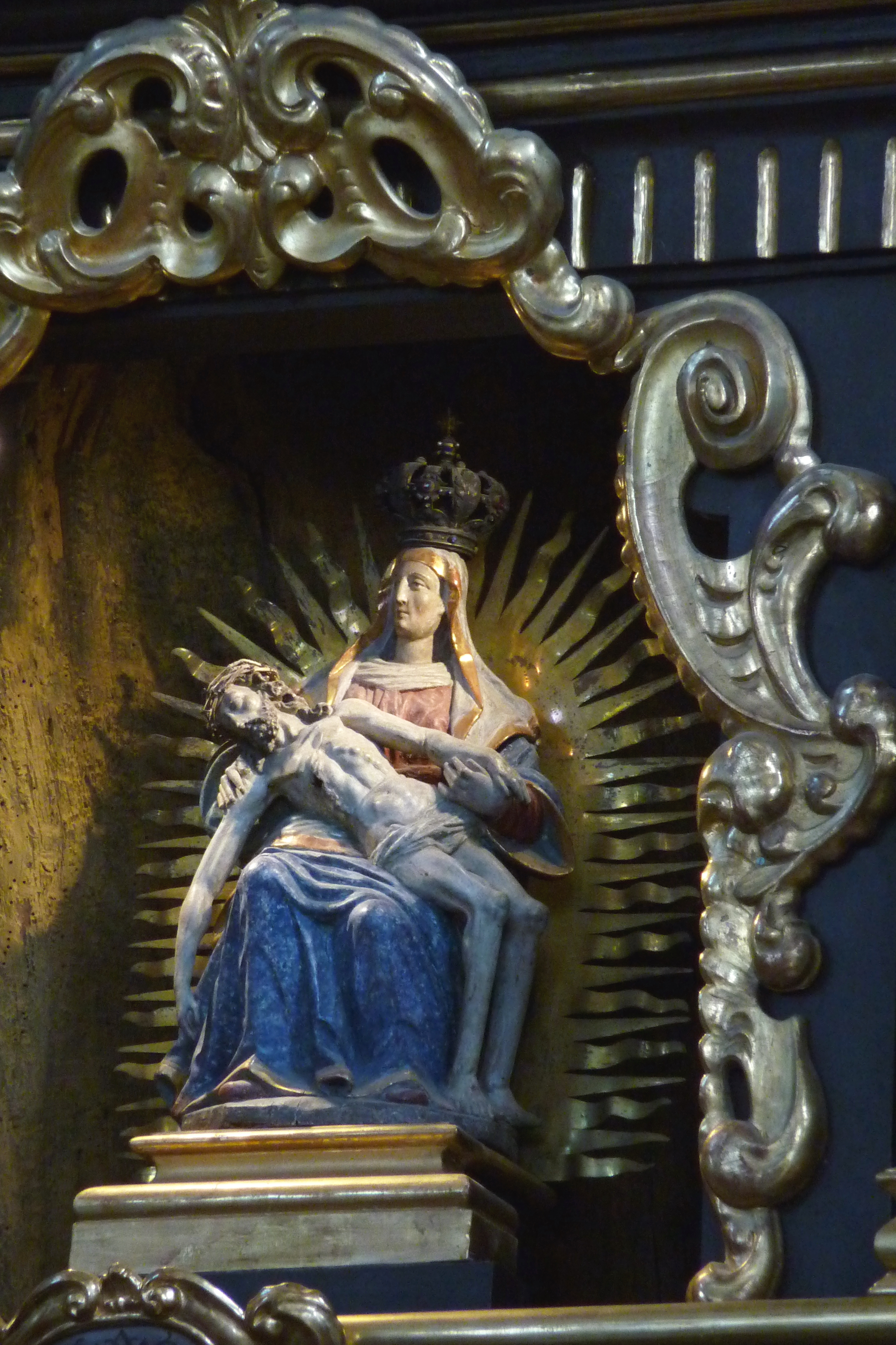 Wallfahrtskirche Maria Birnbaum in Sielenbach im Landkreis Aichach-Friedberg (Bayern), Gnadenbild der Pietà im Hauptaltar aus dem 16. Jahrhundert